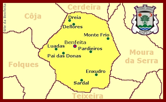 Mapa da Freguesia